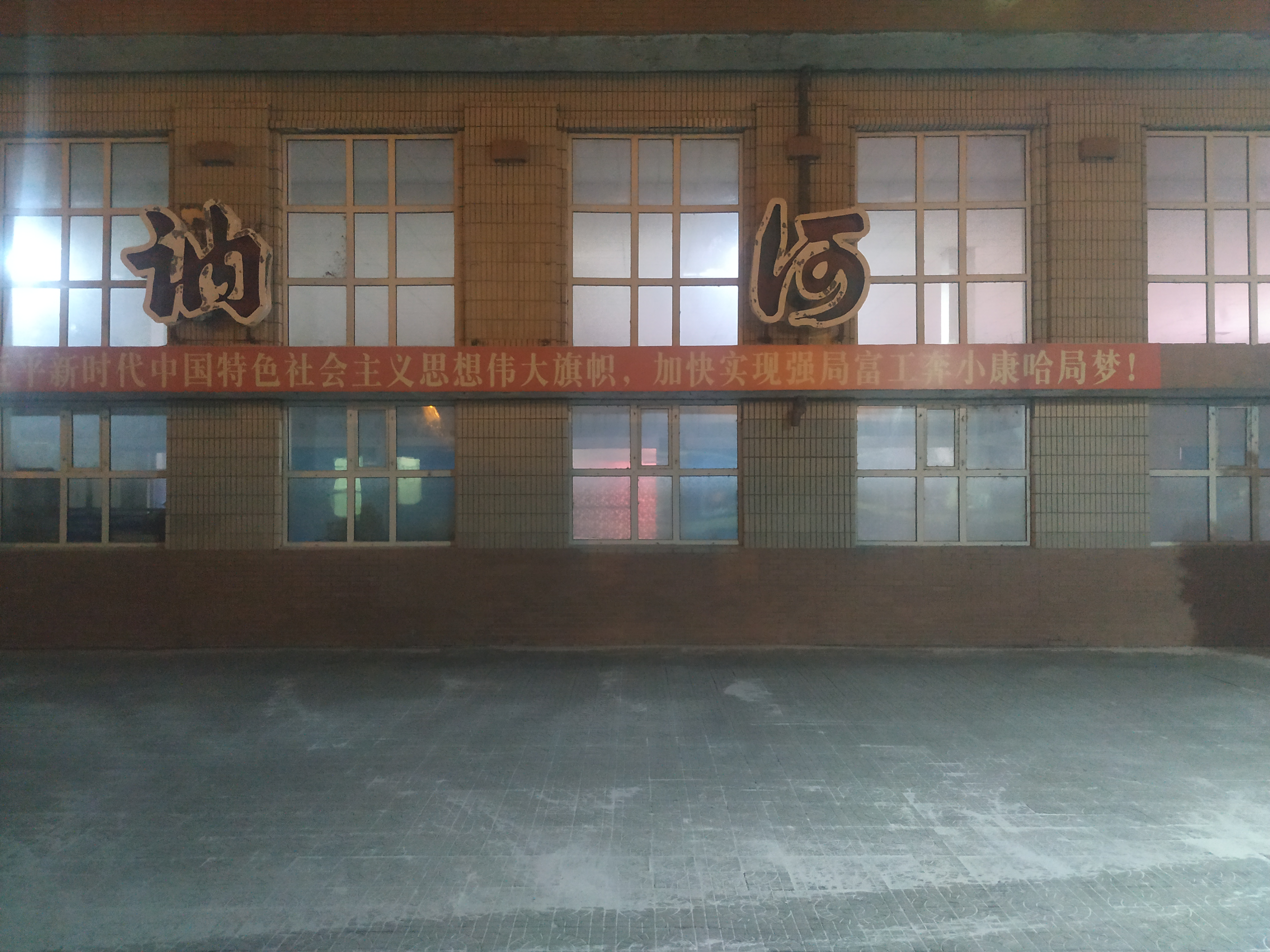 中文（中国大陆）: 讷河火车站